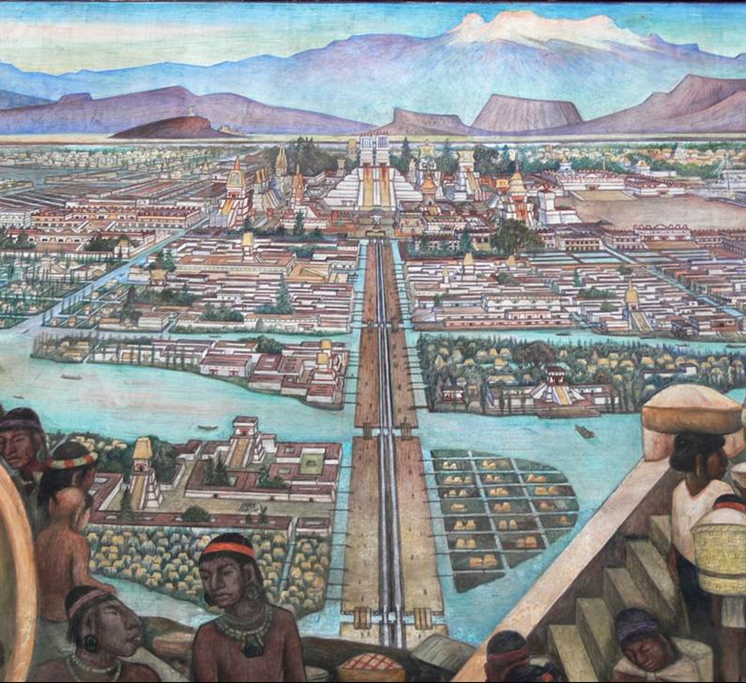 Foto 7 del libro